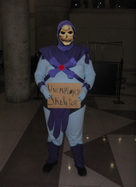 unemployed_skeletor